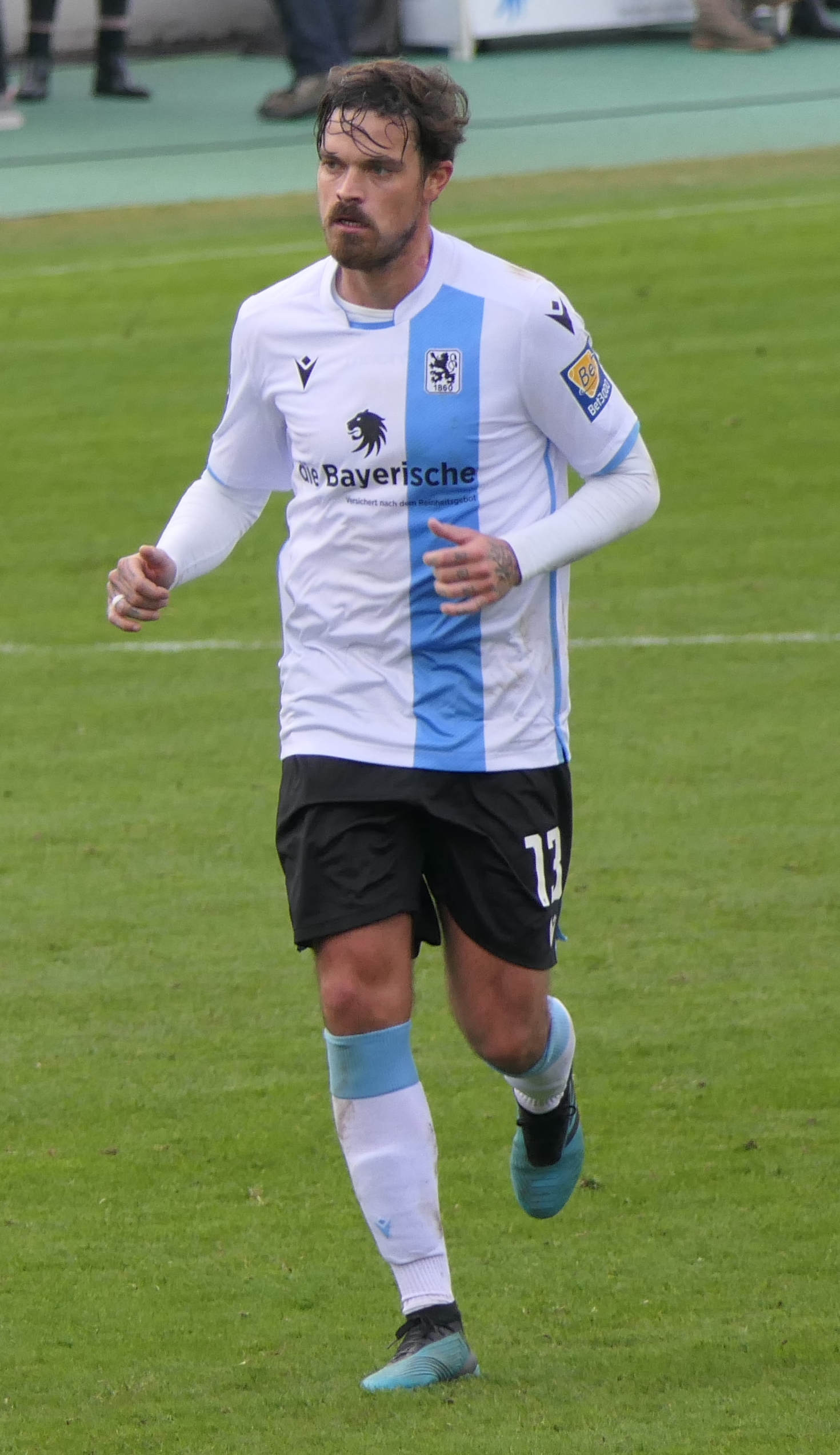 Der Fussballprofi Dennis Erdmann im Trikot vom TSV 1860 München beim Heimspiel gegen Eintracht Braunschweig am 26.01.2020.